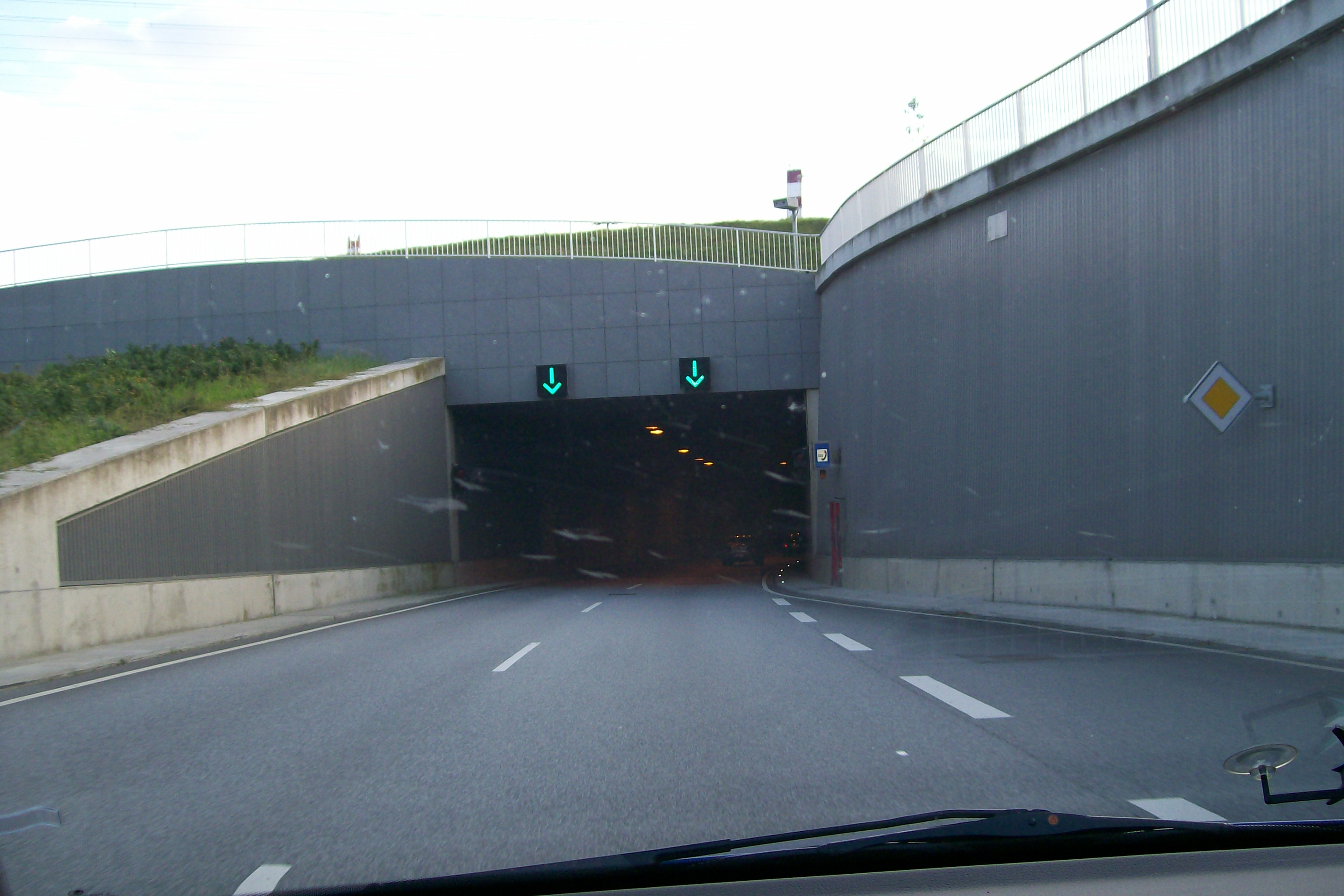 Einfahrt zum Herrentunnel unter der Trave in Lübeck in Richtung Lübeck-Zentrum